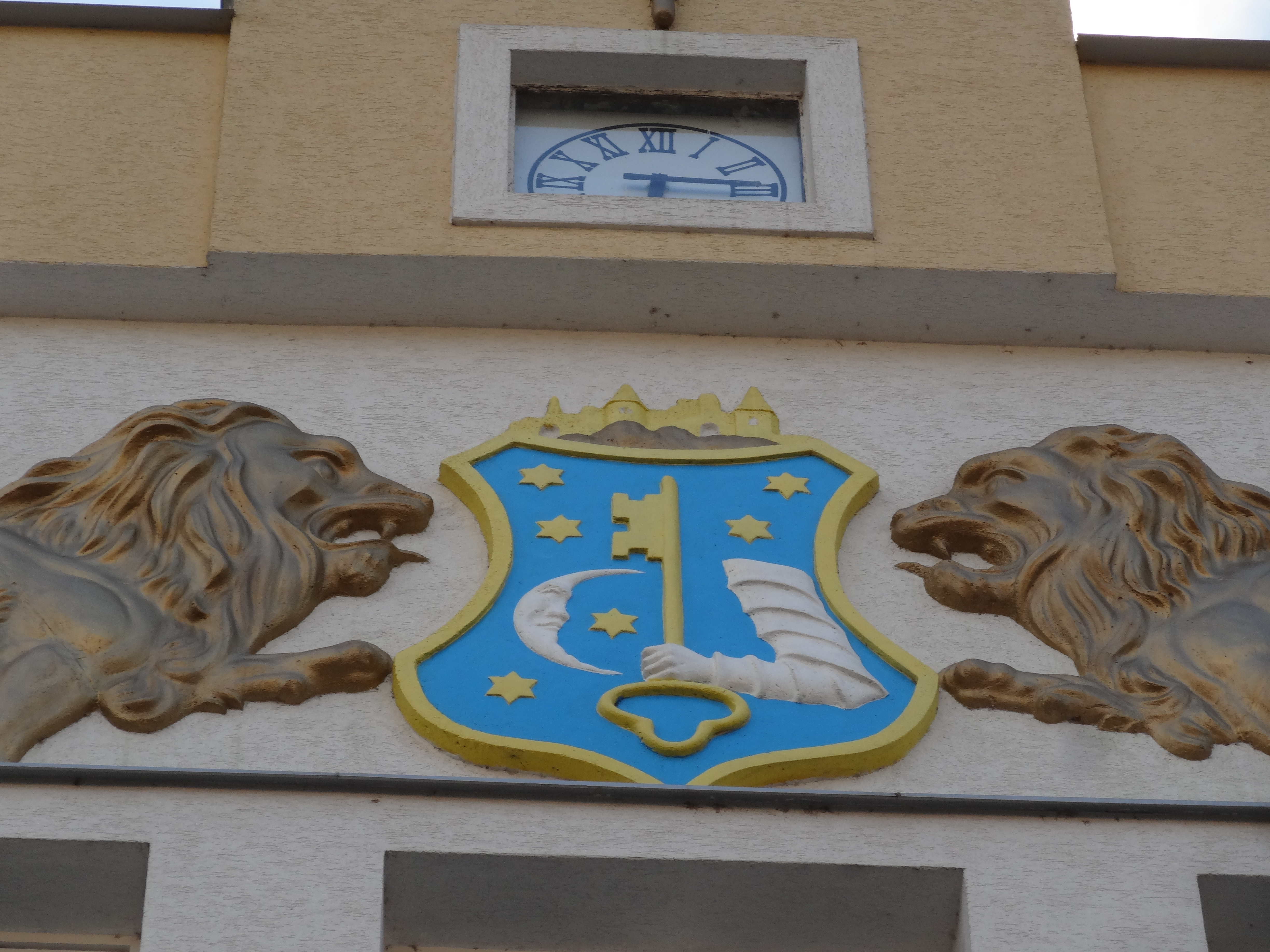 Erb mesta Humenné na fasáde historickej budovy Obecného úradu mesta Humenné